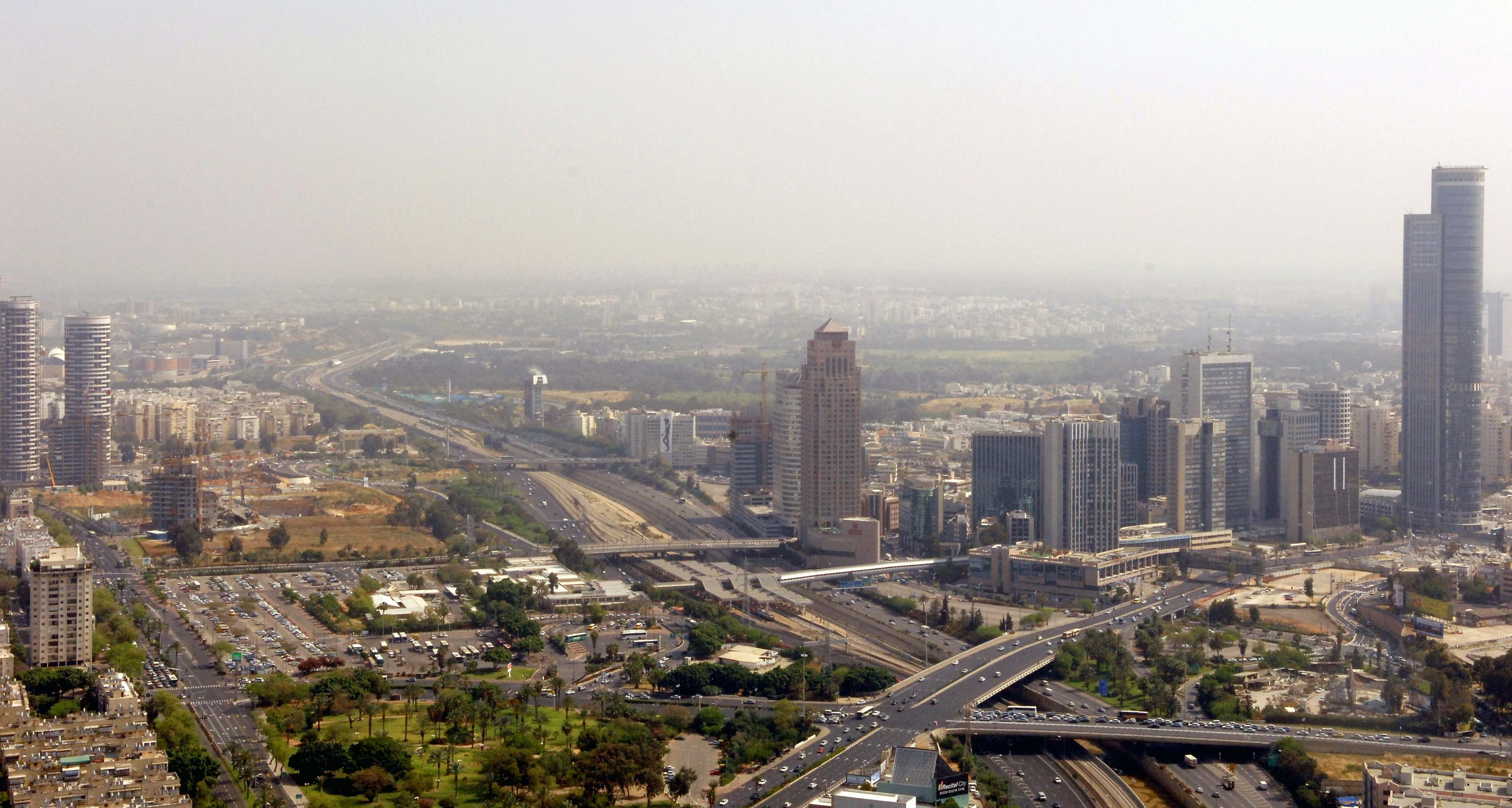 A view of the junction near the diamond exchange complex.. מבט עילי על העיר רמת גן. בתמונה: בורסת היהלומים